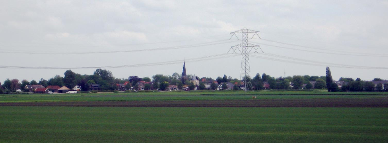 Zevenhuizen, mei 2006